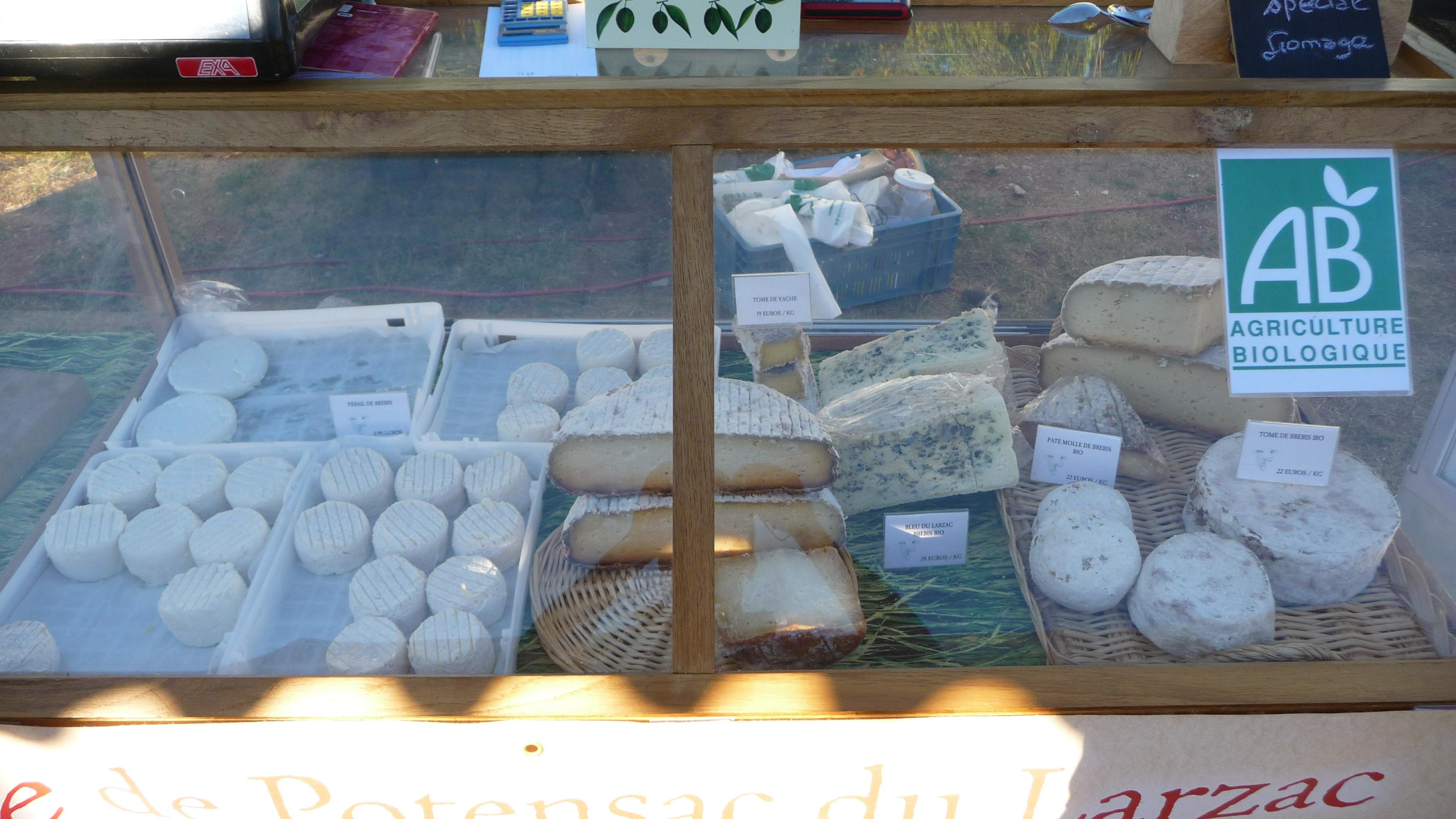 Fromages fermiers de lait cru (vache, brebis), GAEC de Potensac, label agriculture biologique, Larzac (Aveyron, France).